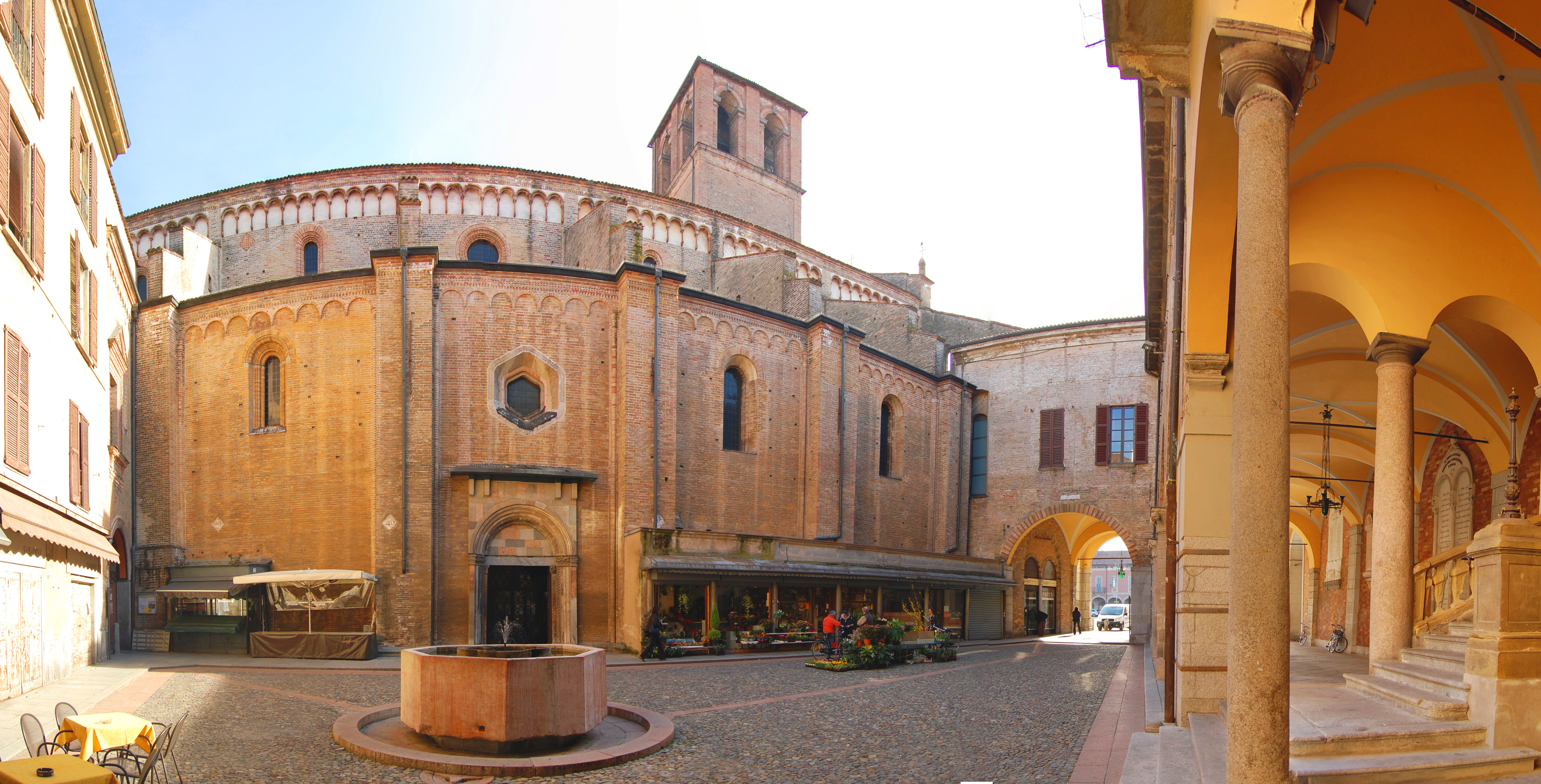 Vista panoramica di piazza Broletto a Lodi